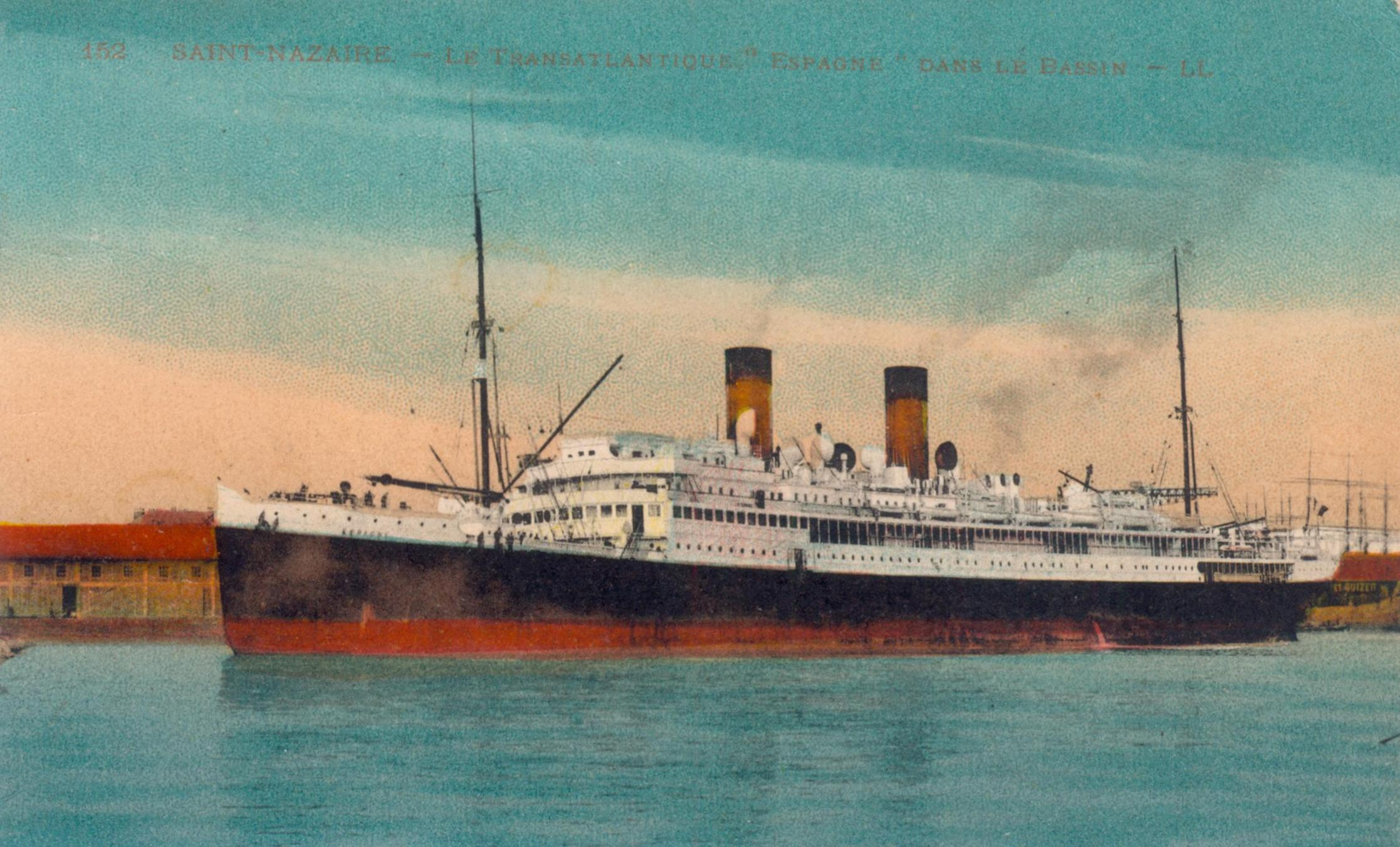 Saint Nazaire Le Transatlantique "Espagne" dans le bassin (Lévy et Neurdein réunis – 44, rue Letellier – Paris)